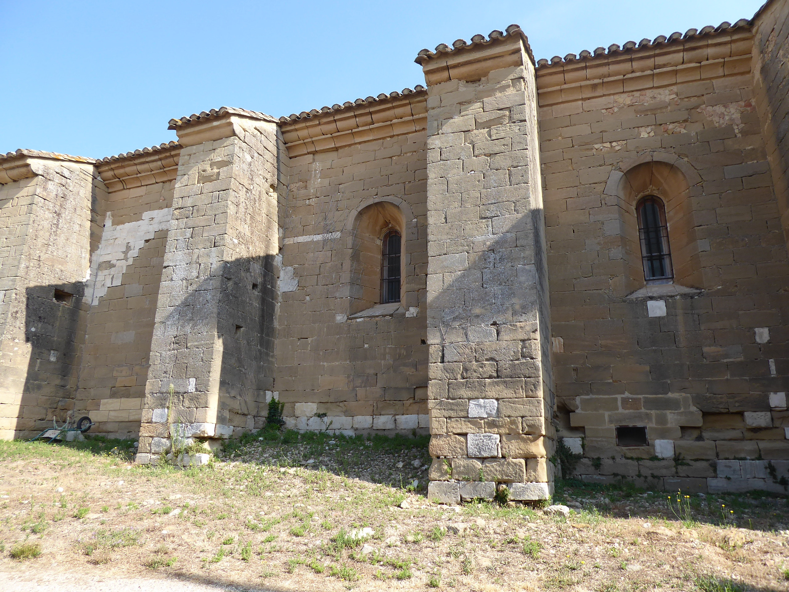 Église Saint-Martin de Serviers-et-Labaume